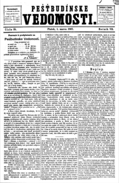 Titulný list periodika Pešťbudínske vedomosti z 19. storočia.